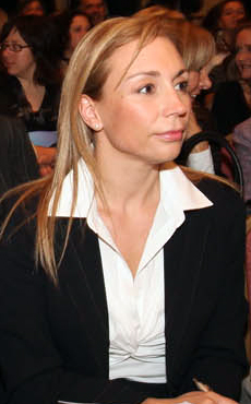 Karen Doggenweiler Lapuente (n. 27 de agosto de 1969, Santiago, Chile) es una periodista y presentadora de la televisión chilena. Está casada con el diputado y actual candidato a la presidencia de la República de Chile Marco Enríquez-Ominami, con quien tiene una pequeña hija llamada Manuela.